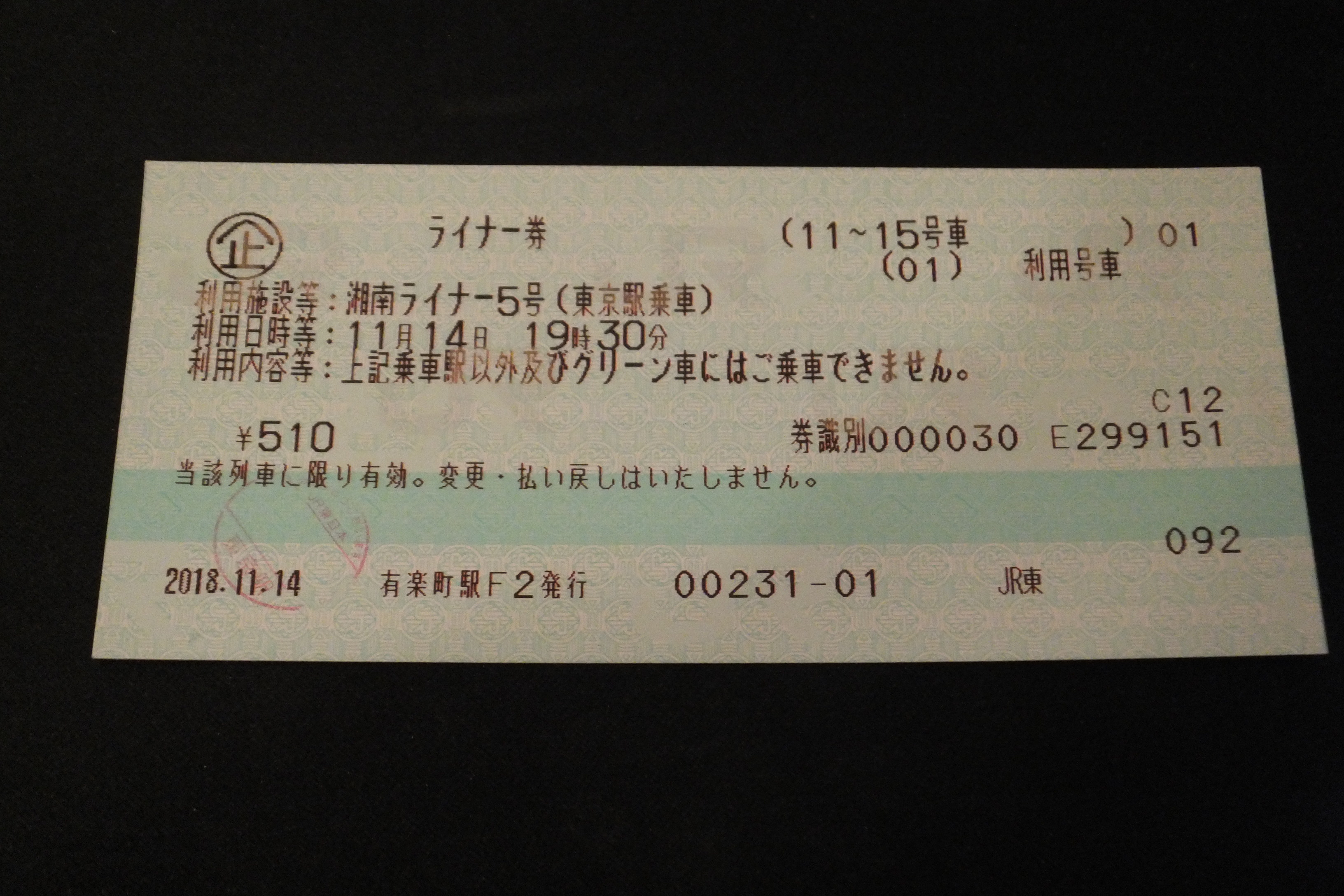 みどりの窓口で発券された、湘南ライナーのライナー券。なお扱いはきっぷとは異なり、旅行商品と同じ形式で発券される。